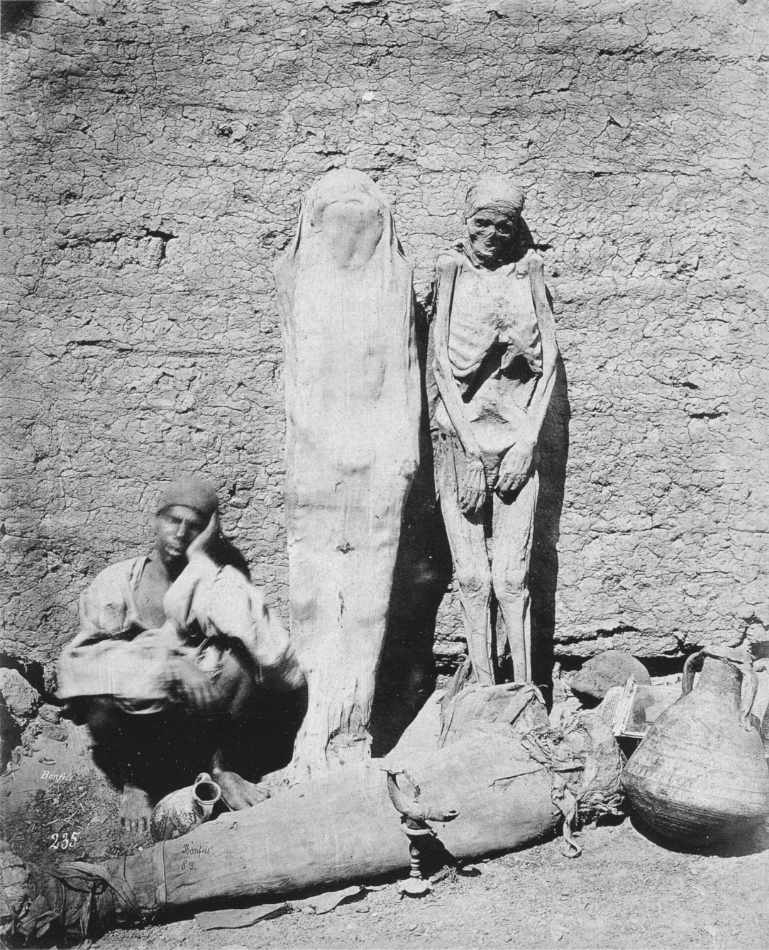 Ein dösender Mumienhändler. Fotografie von Félix Bonfils